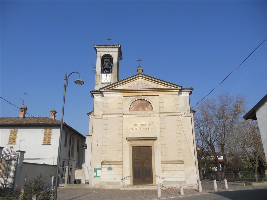 Chiesa di San Giorgio Martire del XV secolo